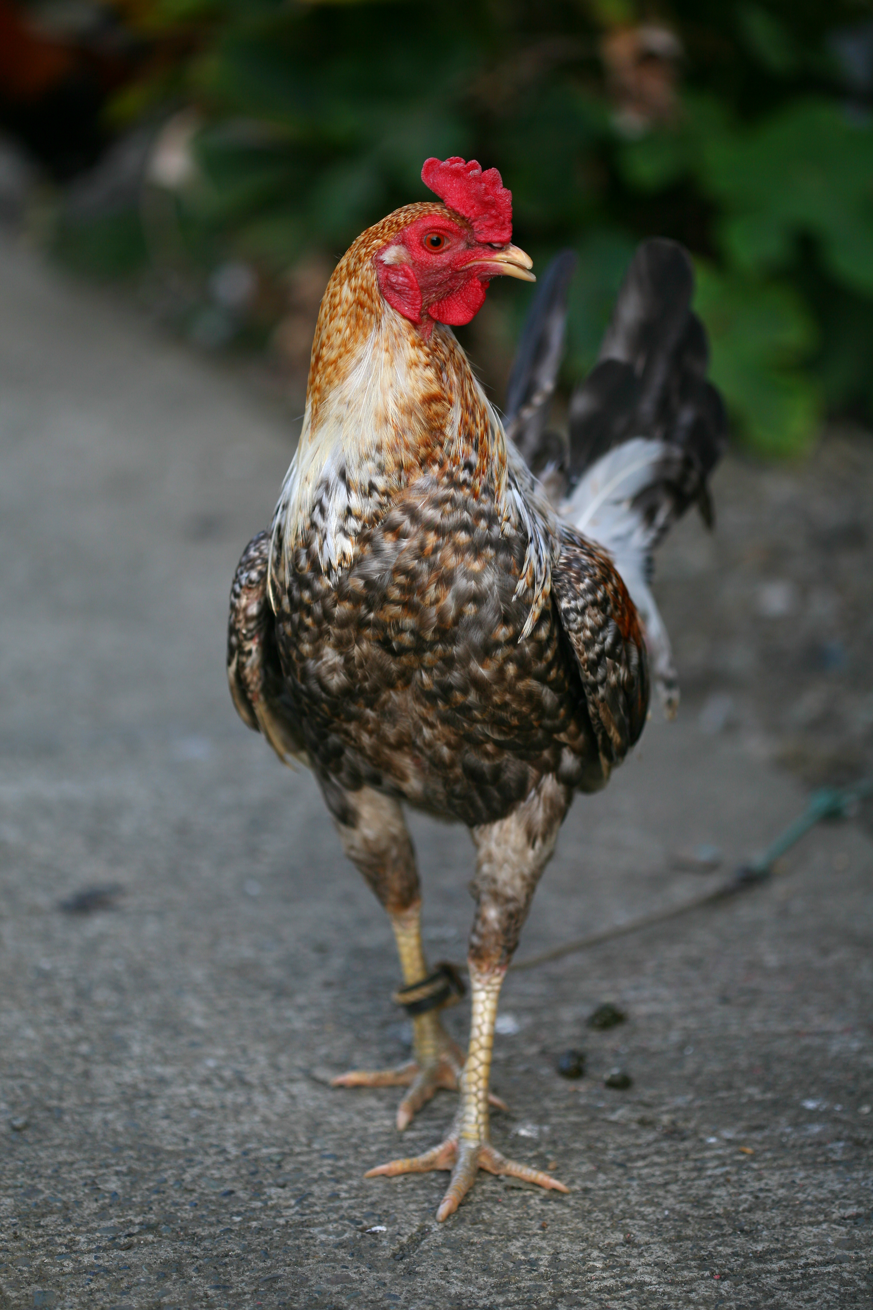 Gallo da combattimento fotografato a Mindanao, Filippine